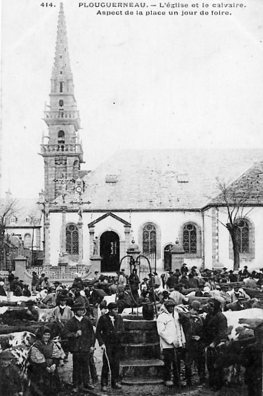 Une foire sur la place de l'église à Plouguerneau vers 1910 (carte postale)